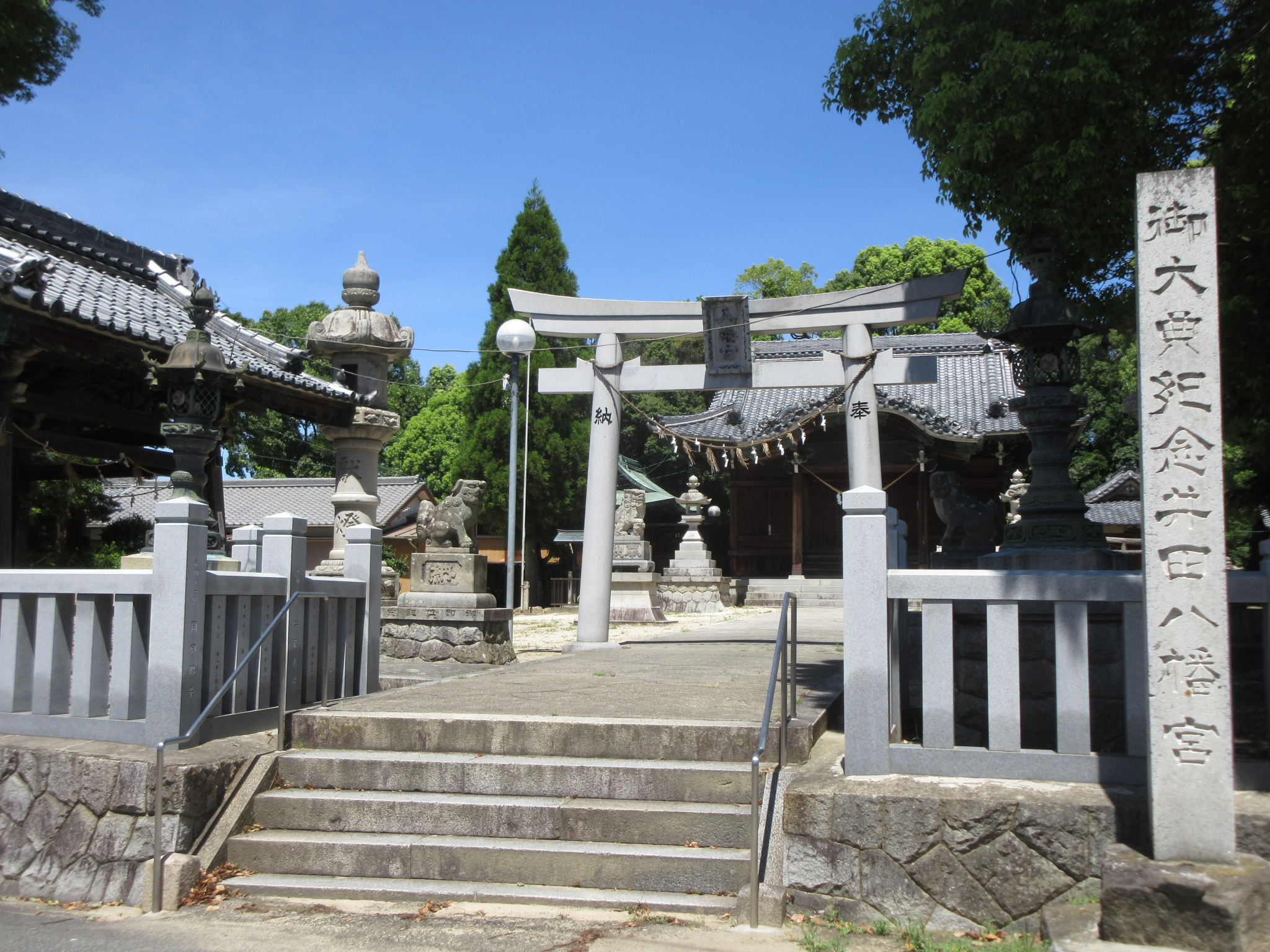 井田八幡宮（岡崎市井田町）